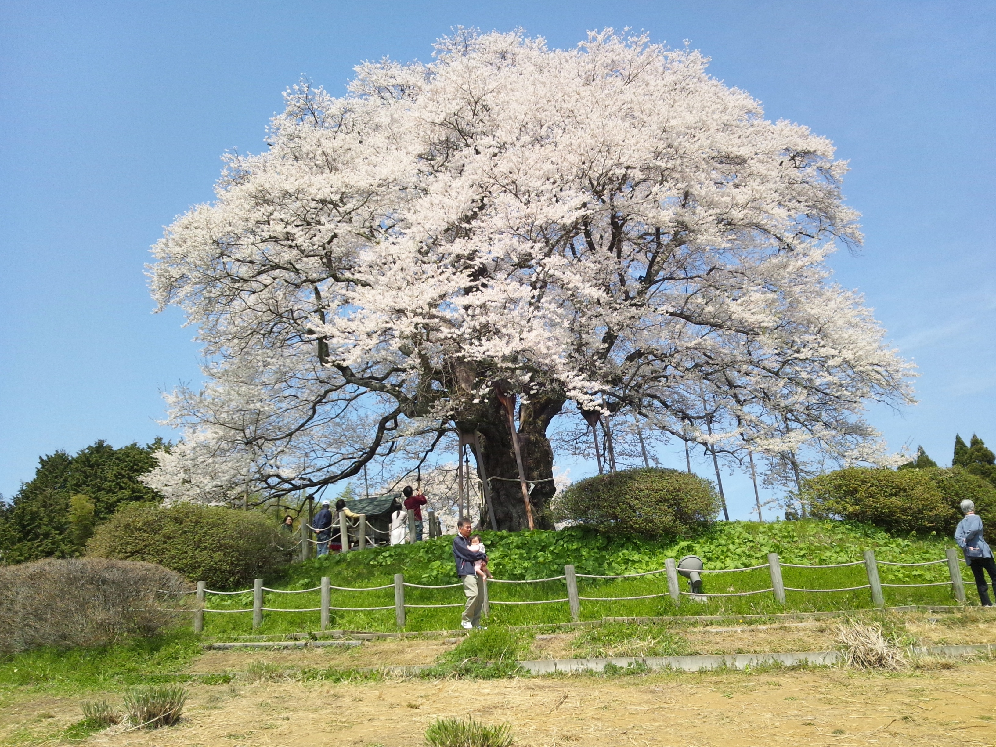 2014年